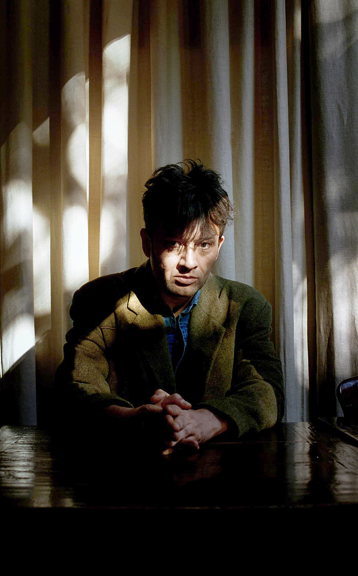 Bart Peeters, Belgisch zanger en televisiefiguur.